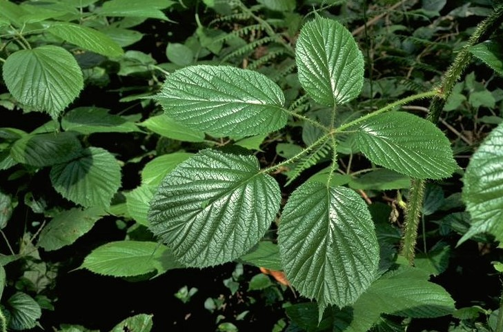 Rubus palmensis A.Hansen